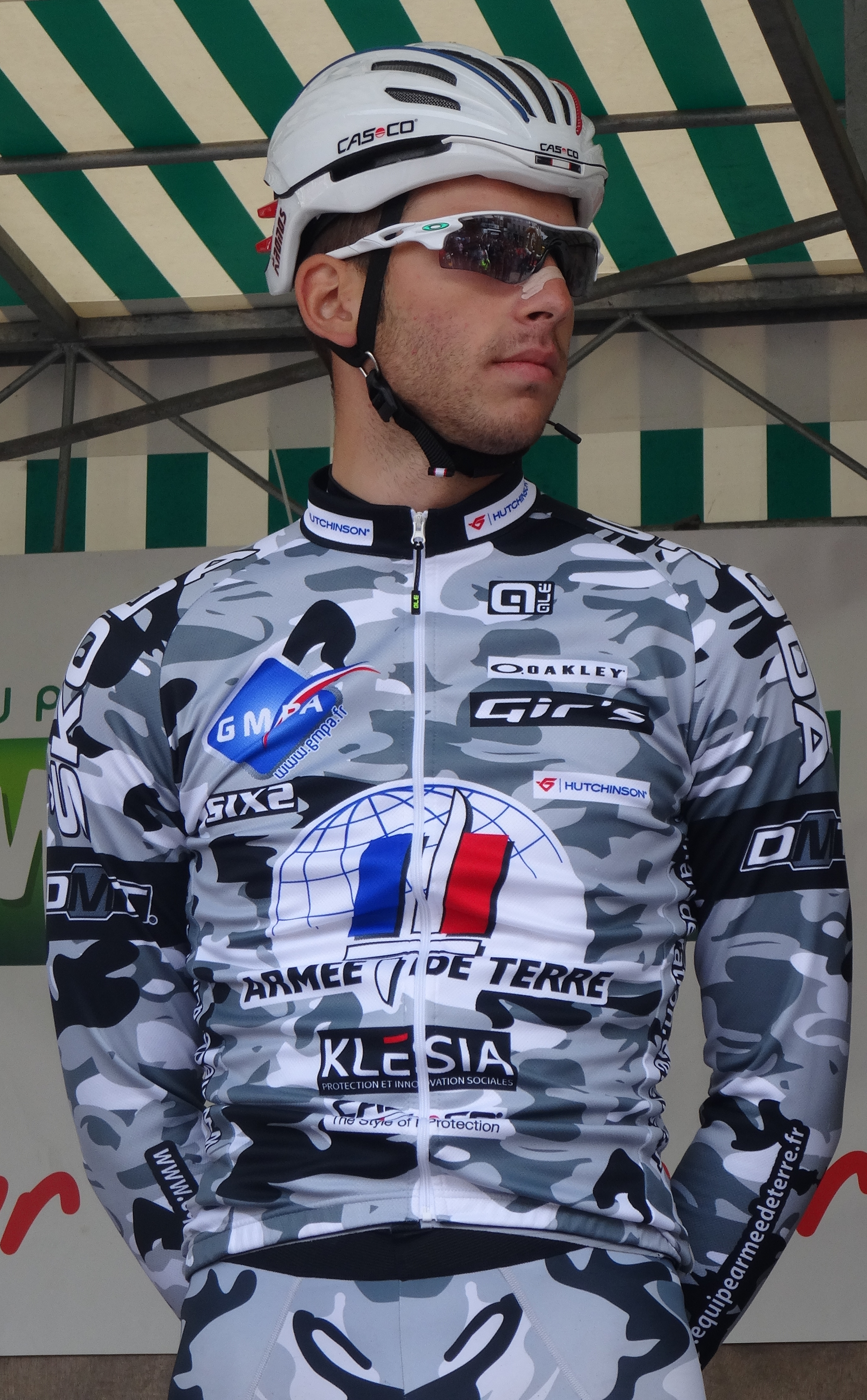 Reportage photographique réalisé le dimanche 17 août à l'occasion du départ et de l'arrivée du Grand Prix de Bavay 2014 à Bavay, Nord, Nord-Pas-de-Calais, France.